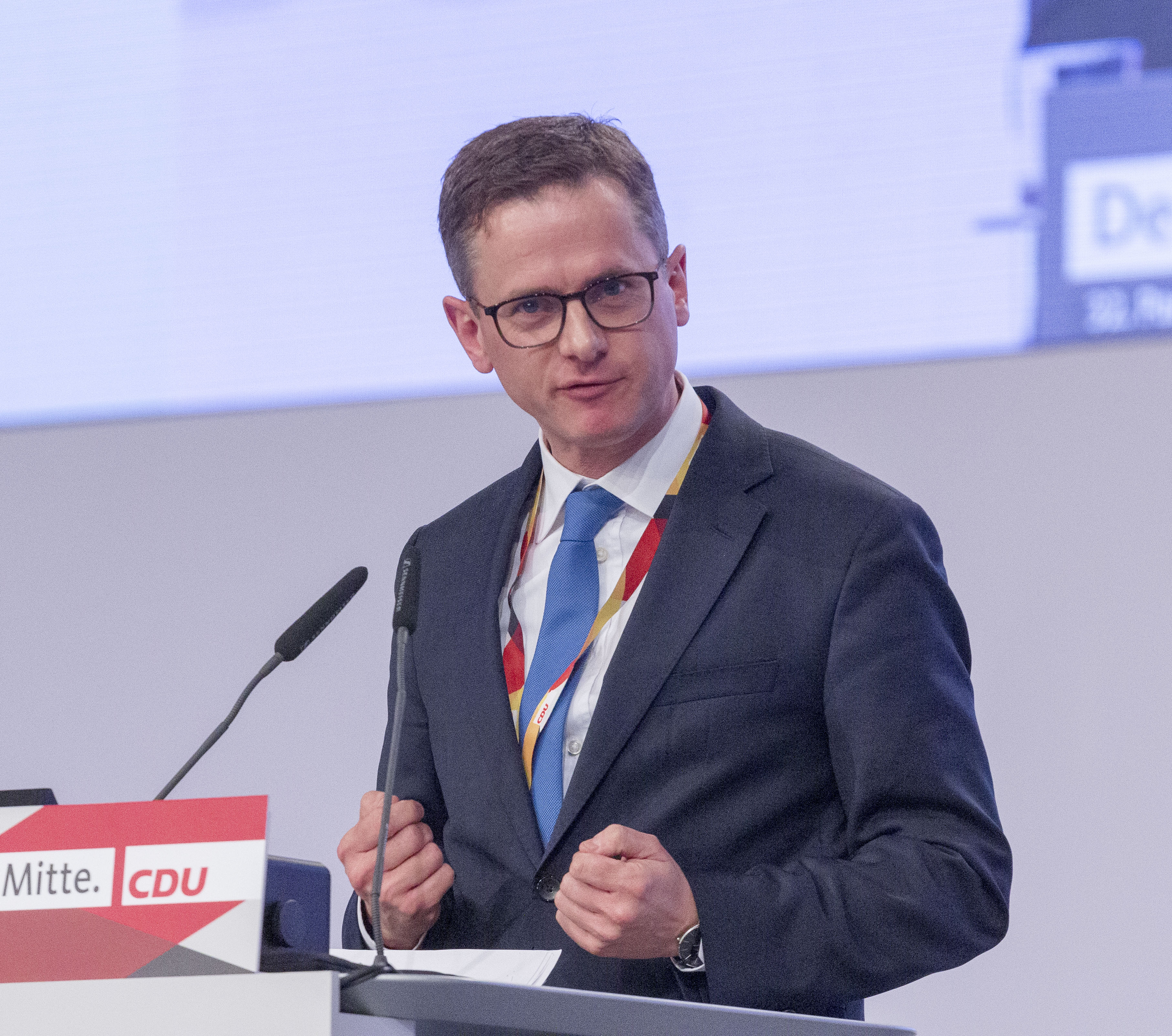 Carsten Linnemann auf dem CDU Parteitag 2019 am 22. November 2019 in Leipzig.